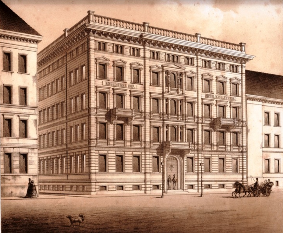 Ansicht des Hotel d'Angleterre (Englischer Hof) in Berlin 1859.